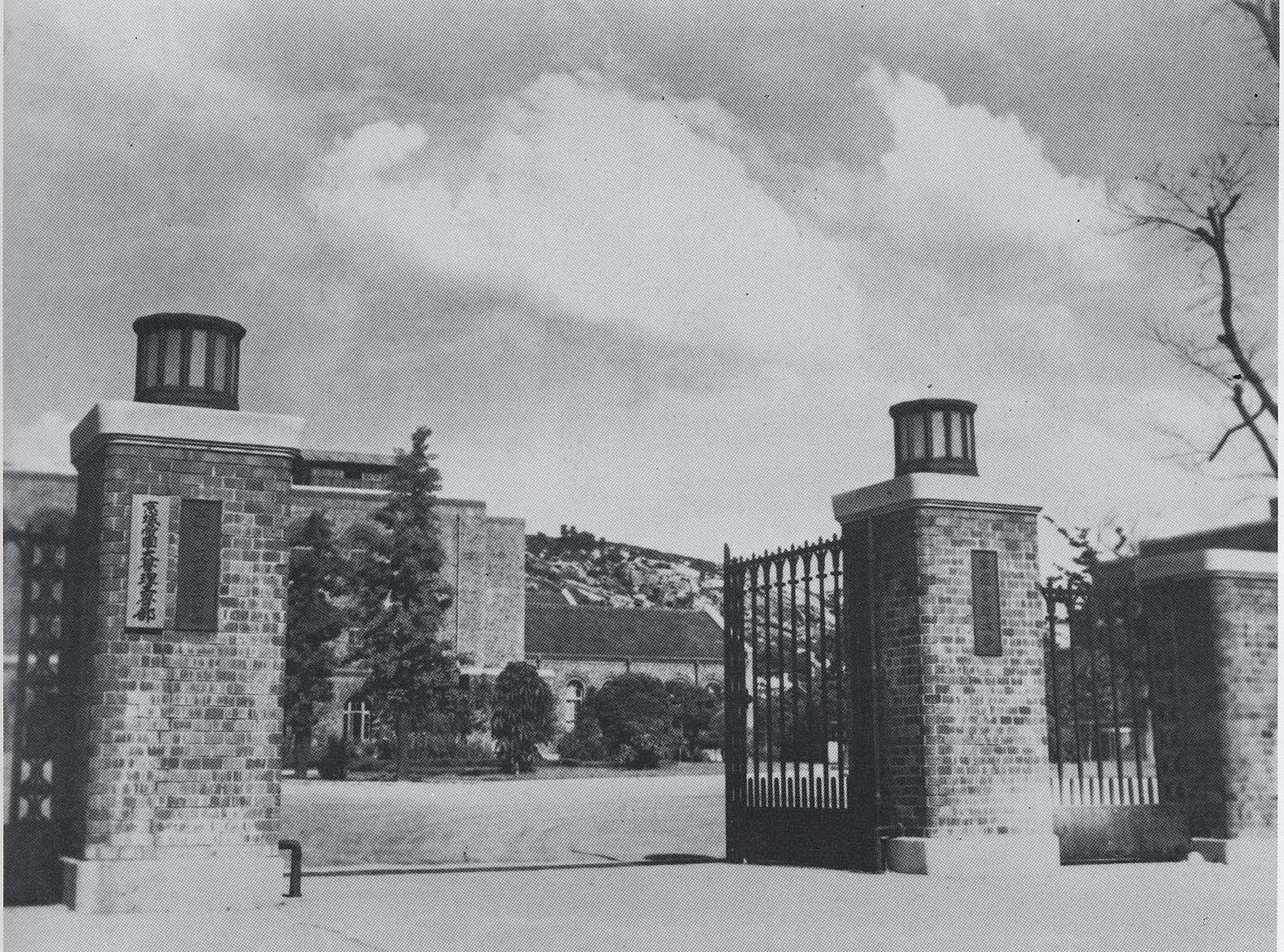 京城帝国大学正門